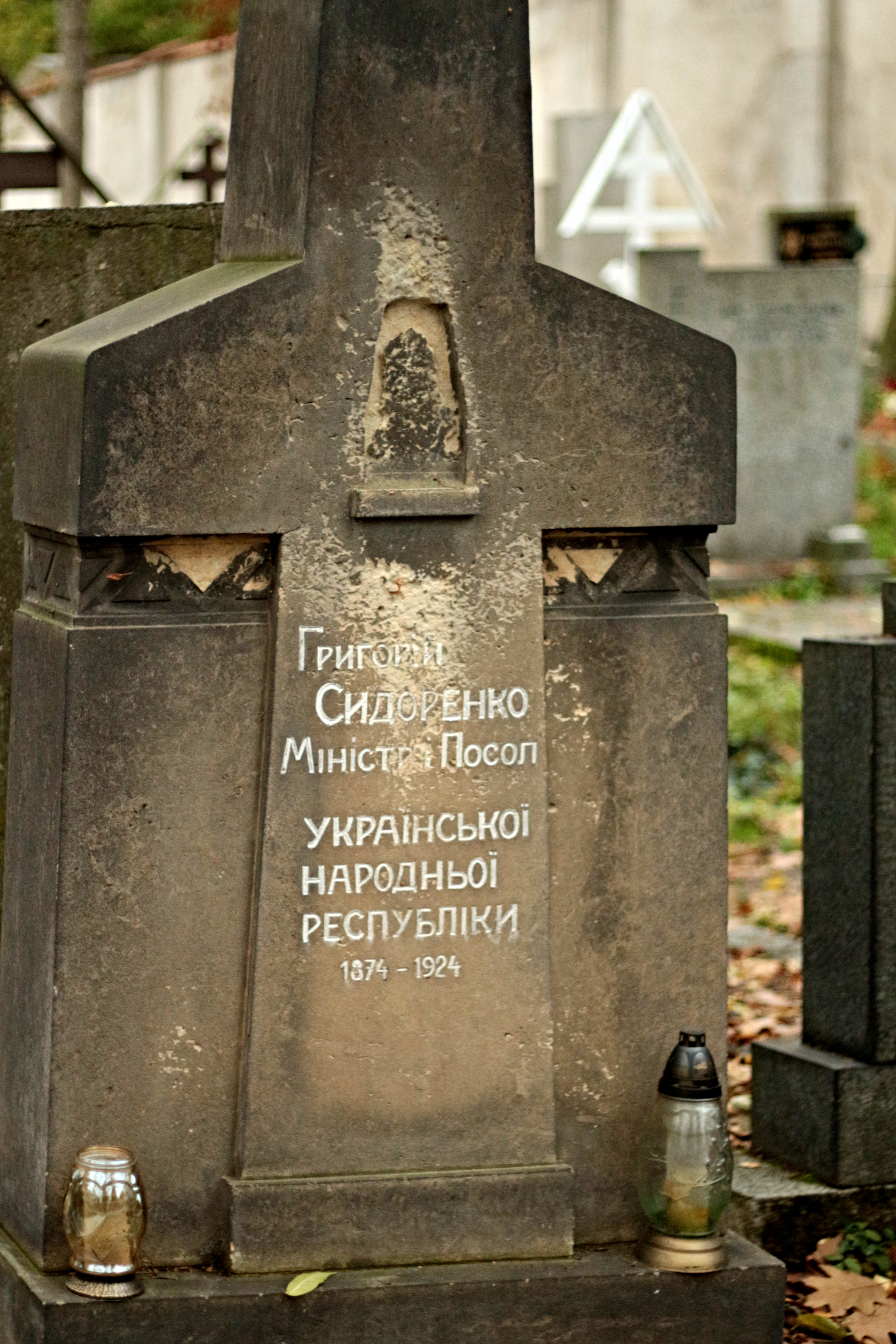 Olšany hrob H. M. Sydorenko